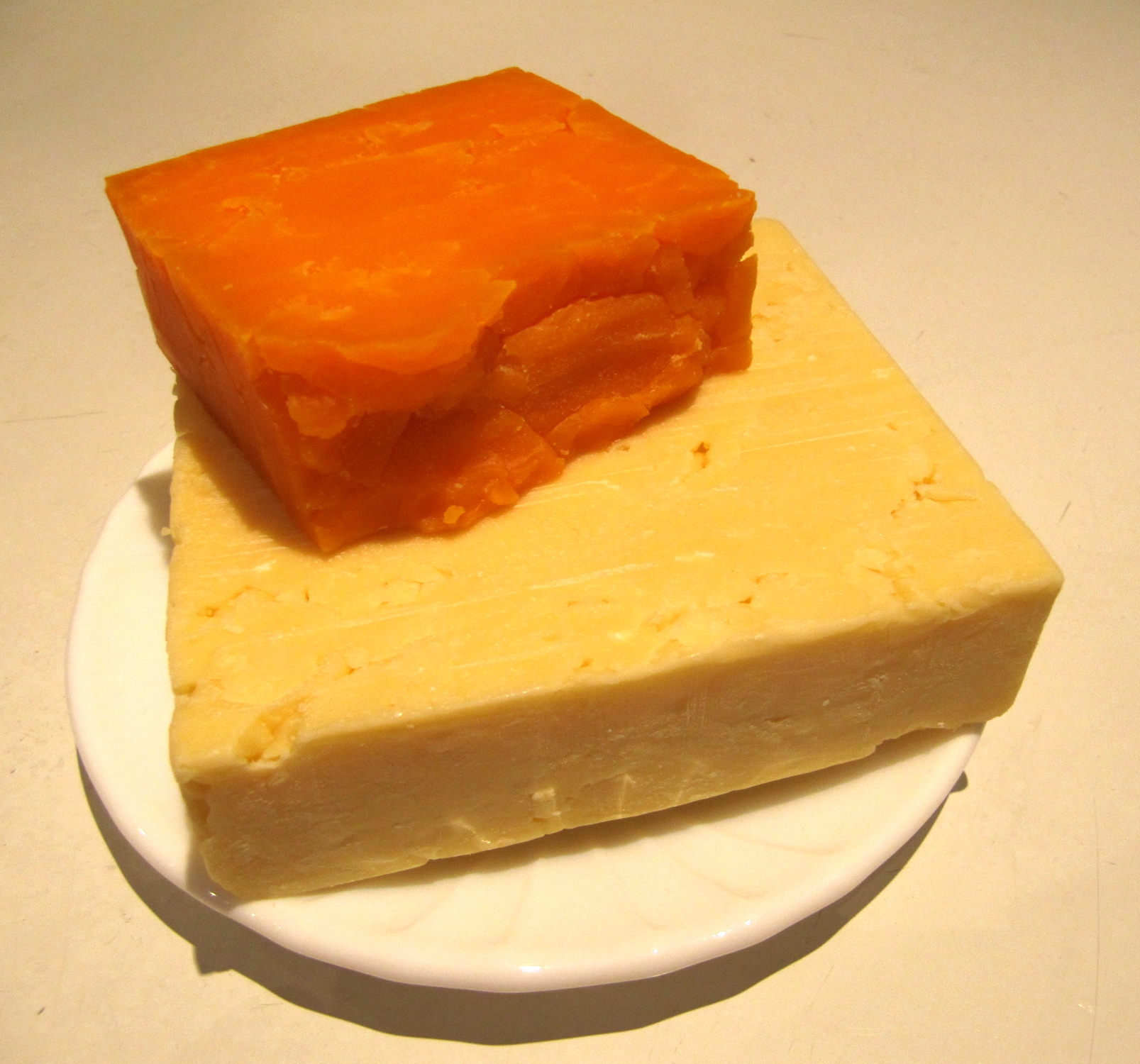 Junger und alter Cheddar